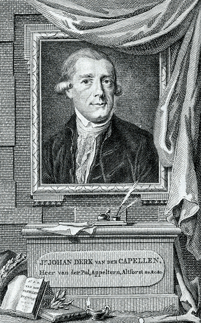 Joan Derk van der Capellen tot den Pol